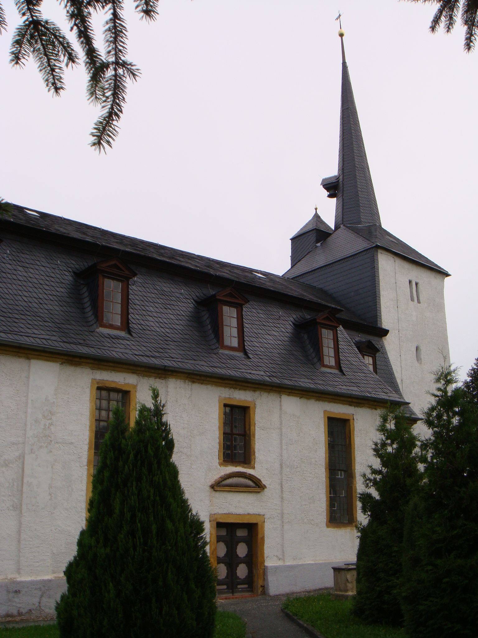 Evangelische Kirche Kleinbrembach